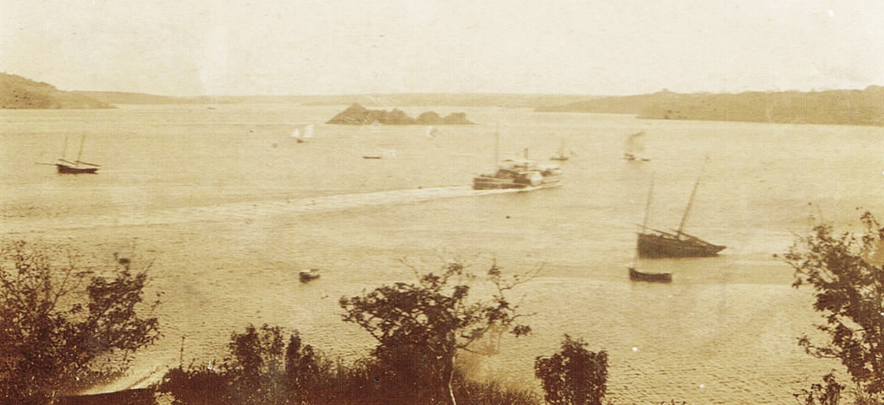 Panorama sur la Rance depuis la maison servannaise du chanoine et académicien Louis Duchesne (1843-1922) sur la Cité d'Aleth à Saint-Malo, France. On aperçoit au centre le rocher de Bizeux.